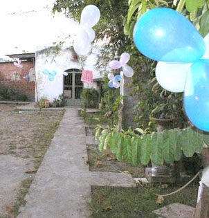 Foto panorâmica da casa-de-santo